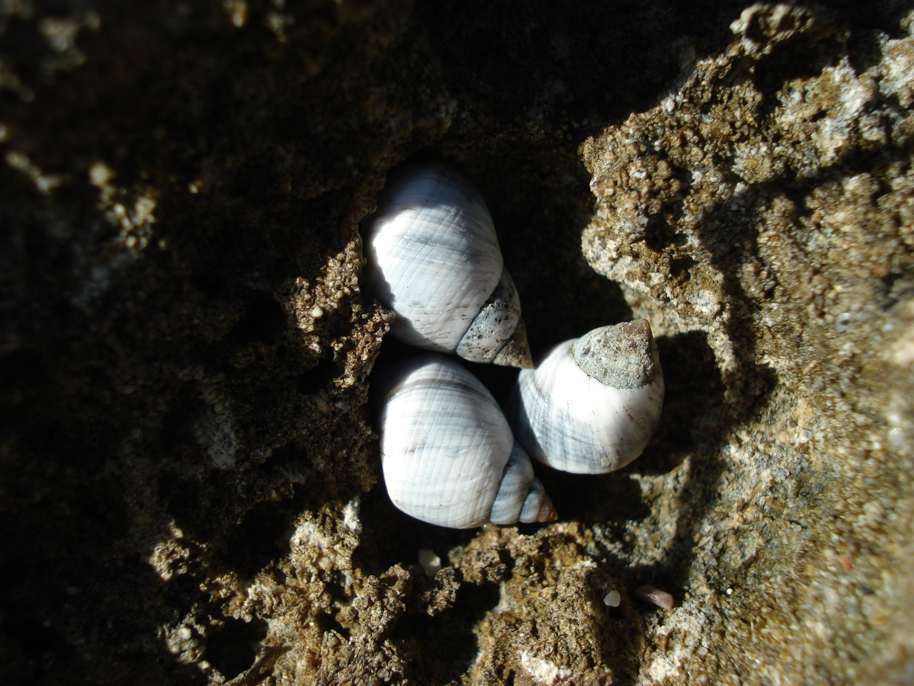 Austrolittorina unifasciata, a periwinkle in the family Littorinidae; in crevice on limestone in intertidal zone, Gnarabup, Western Australia